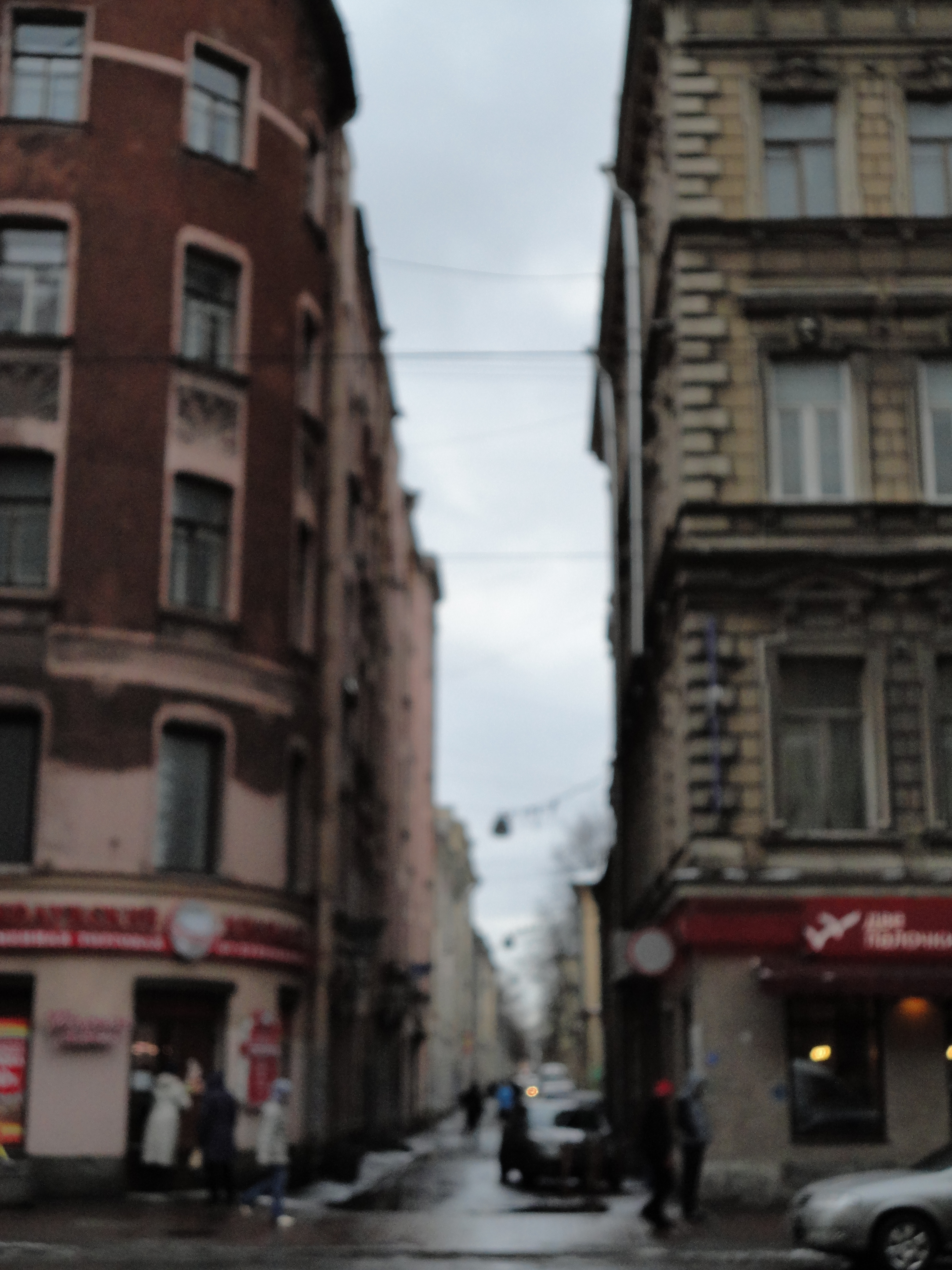 Въезд на ул. Репина - самую узкую улицу Санкт-Петербурга - со стороны Среднего проспекта Васильевского острова.